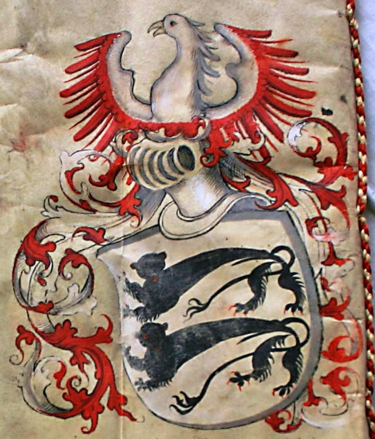 Wappen der Grafen von Hohenlohe